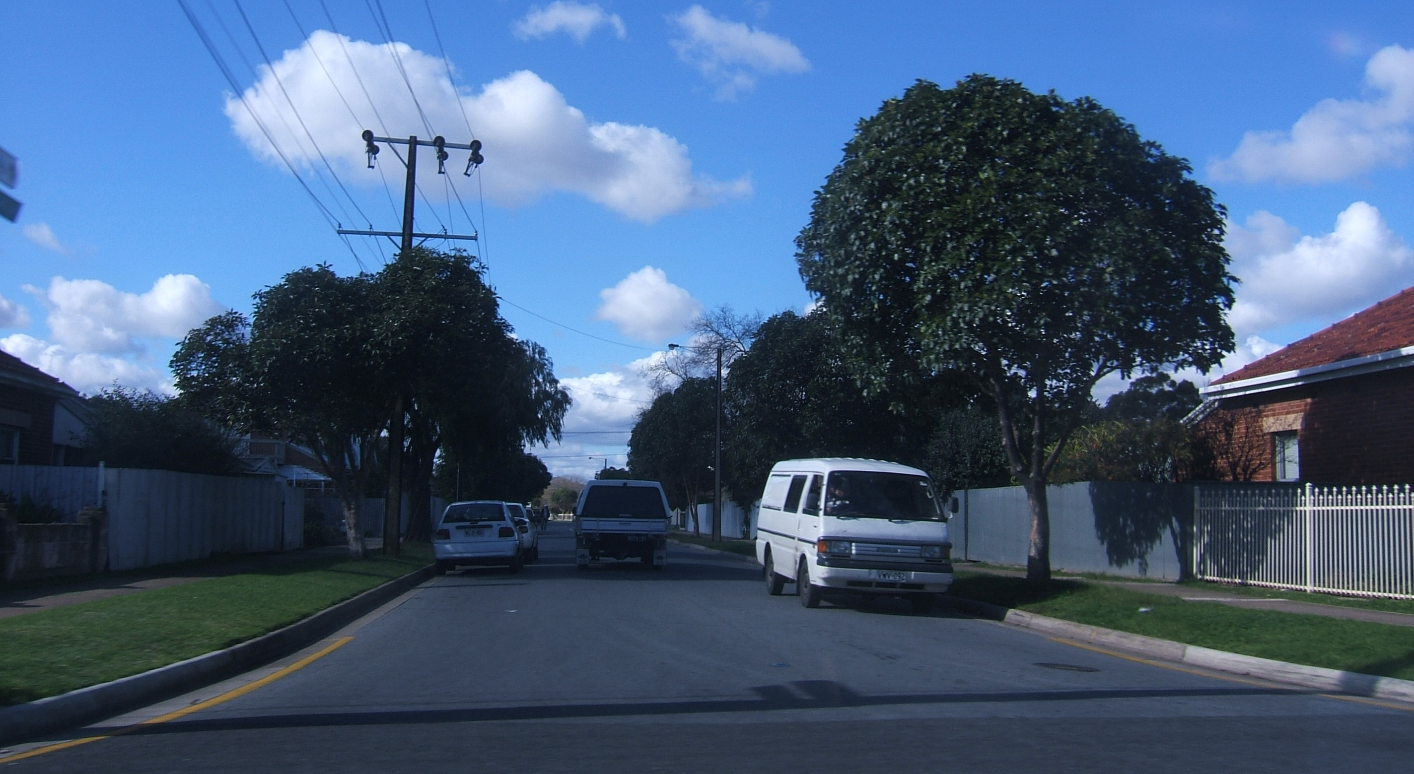 Allenby Gardens, Adelaide